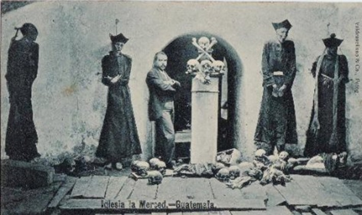 Momias en las catacumbas de la Iglesia de la Merced en la Ciudad de Guatemala. Terremoto de Guatemala de 1917-1918.